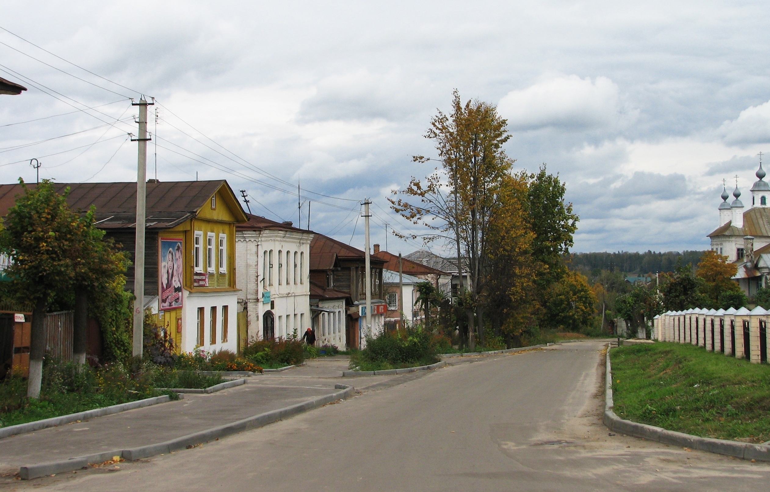 АНСАМБЛЬ ЗАСТРОЙКИ ЦЕНТРА СЕЛА (Ивановская область, Иваново, Лежневское г.п. Советская площадь, 3 Советская площадь, 1 Советская площадь, 8б Советская площадь, 8а Советская площадь, 8г)